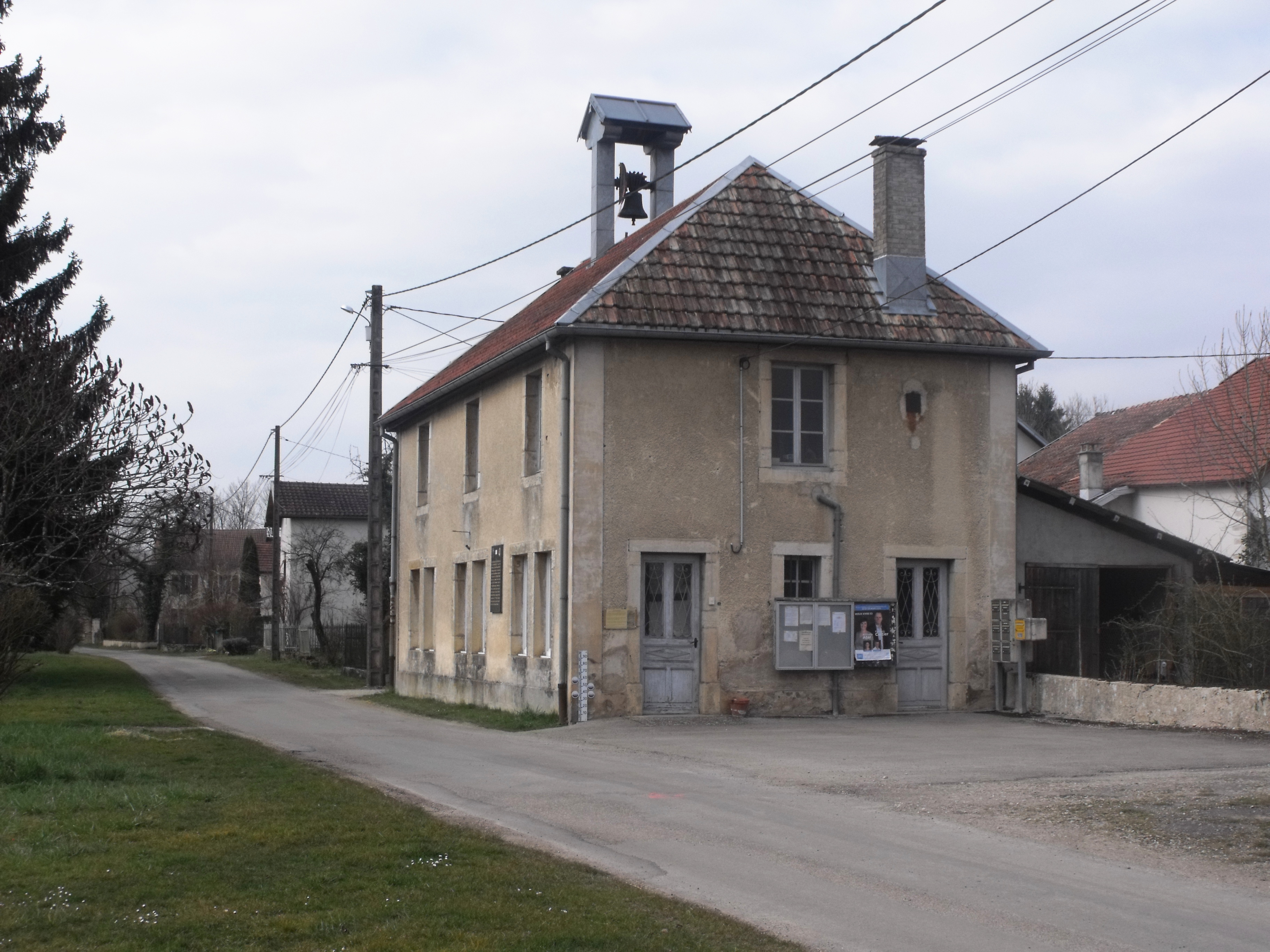 Mairie de Blussangeaux, Doubs, France